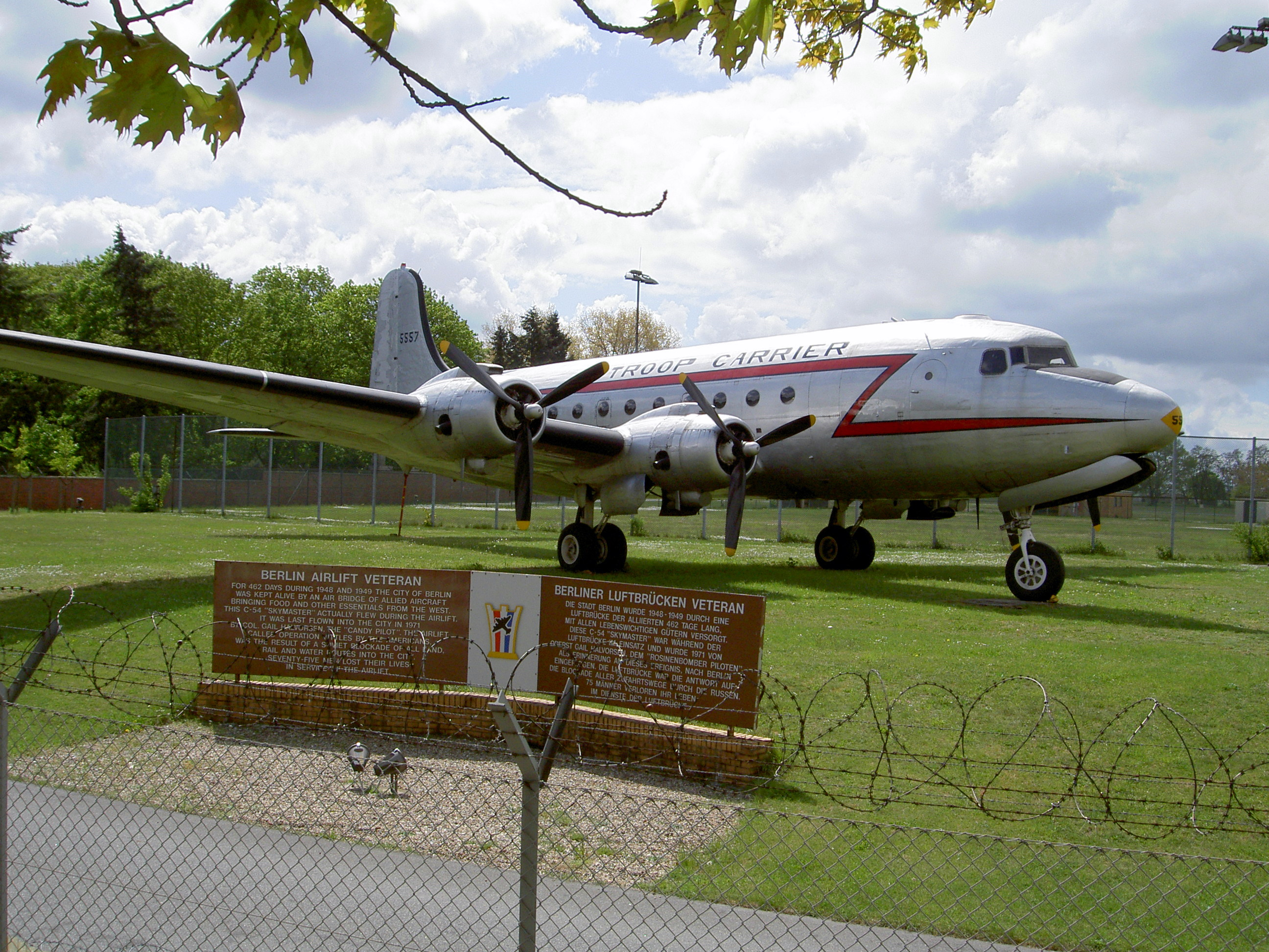 C-54 Skymaster (Rosinenbomber) USAF 5557 at Flughafen Tempelhof